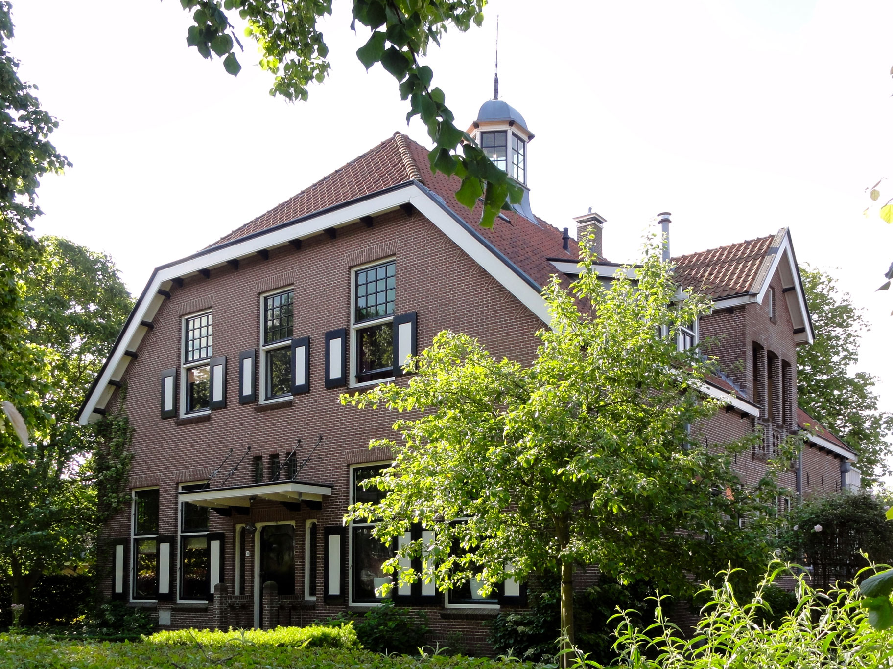 Oosteinde 38 in Sint-Jacobiparochie